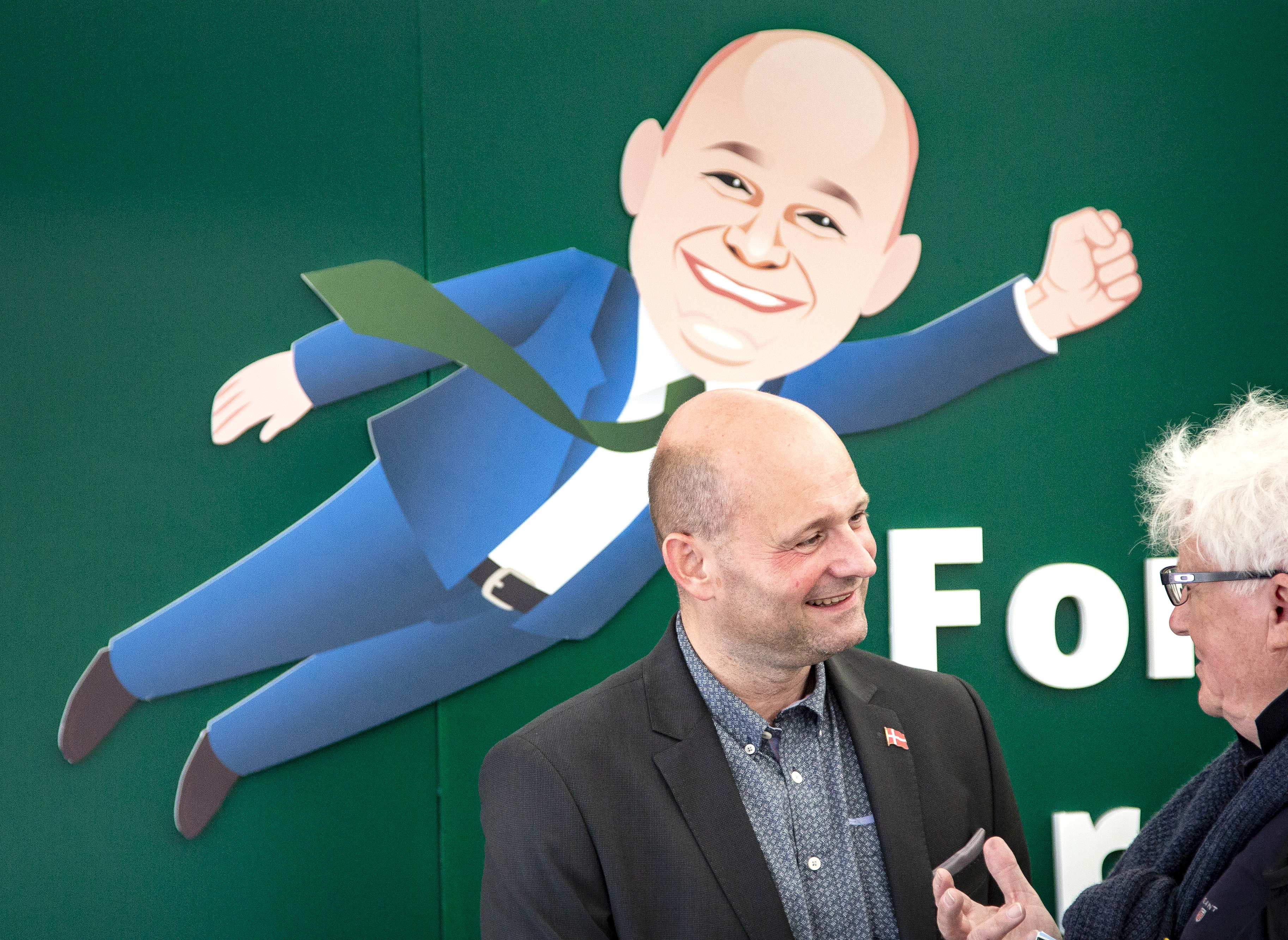 De Konservatives partiledare Søren Pape Poulsen vid Folkemødet i Allinge på Bornholm. Photo: News Øresund - Emil Persson © News Øresund - Emil Persson (CC BY 3.0). Detta verk av News Øresund är licensierat under en Creative Commons Erkännande 3.0 Unported-licens (CC BY 3.0). Bilden får fritt publiceras under förutsättning att källa anges. .The picture can be used freely under the prerequisite that the source is given. News Øresund, Malmö, Sweden News Øresund är en oberoende regional nyhetsbyrå som är en del av det oberoende dansk-svenska kunskapscentrat Øresundsinstituttet.. .